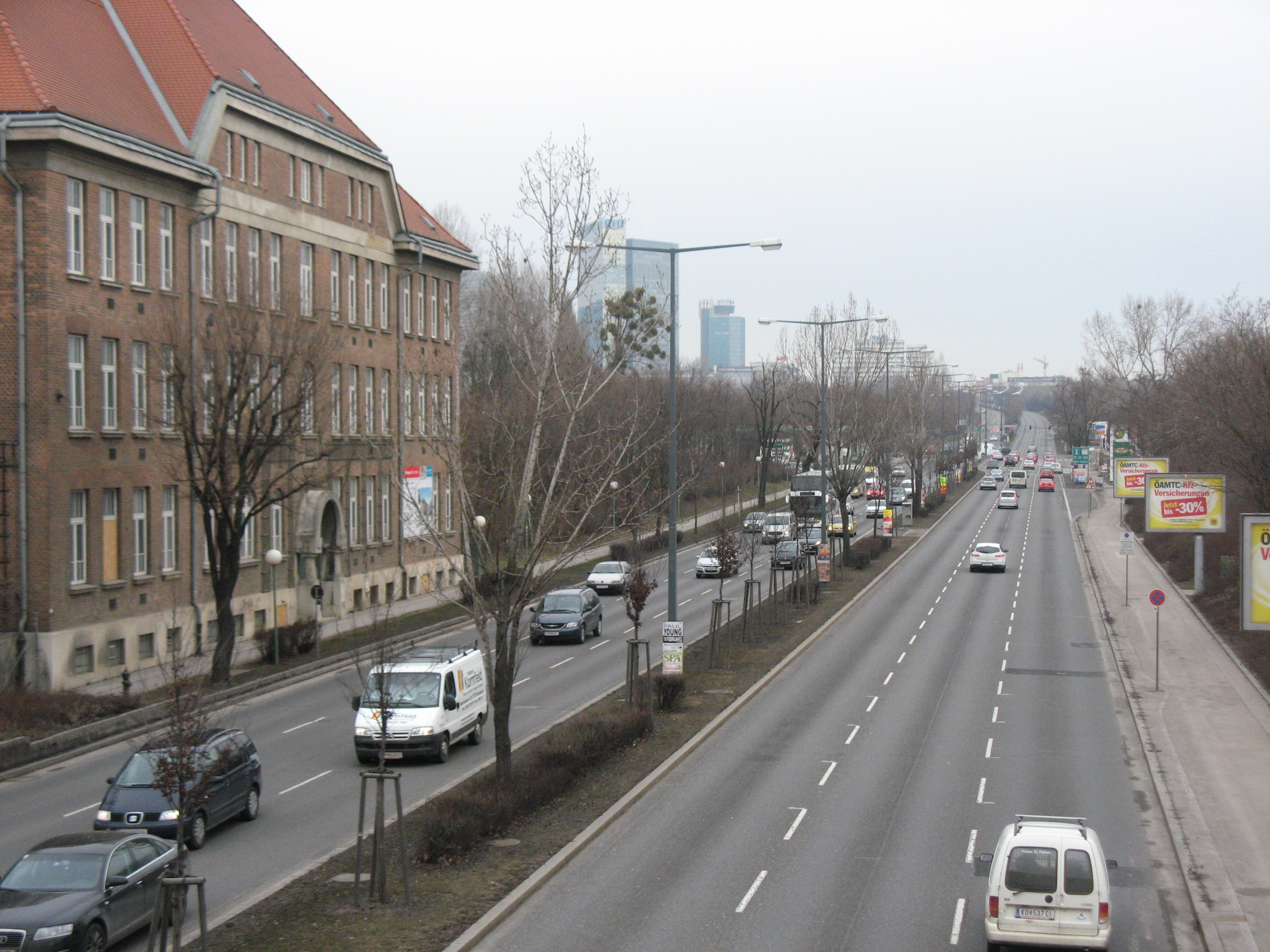 Ehemalige Volksschule (1912-13), Triester Straße 114, Wien-Favoriten